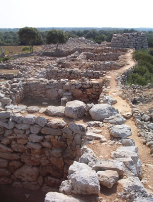 Bildbeschreibung: El poblat prehistòric de Capocorb Vell Fotograf: Juan Costa Datum: 2002 es troba a la carretera que va des de l'arenal al cap blanc al kilòmetre 23.